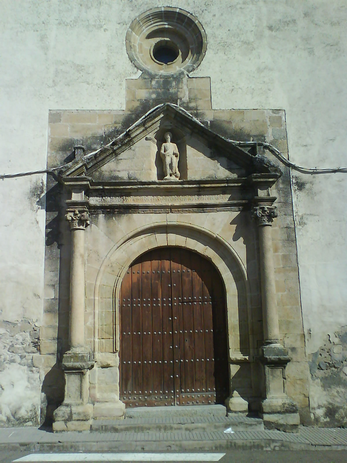 Elésia San Bartolu